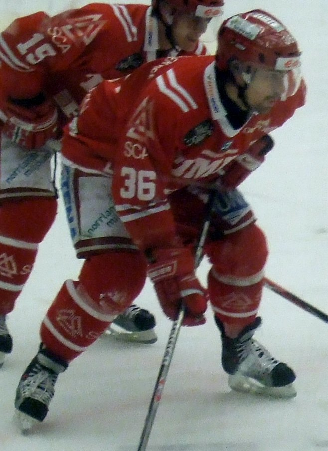 Ice hockey player Pär Styf of Timrå IK in E.ON Arena, Timrå, Sweden